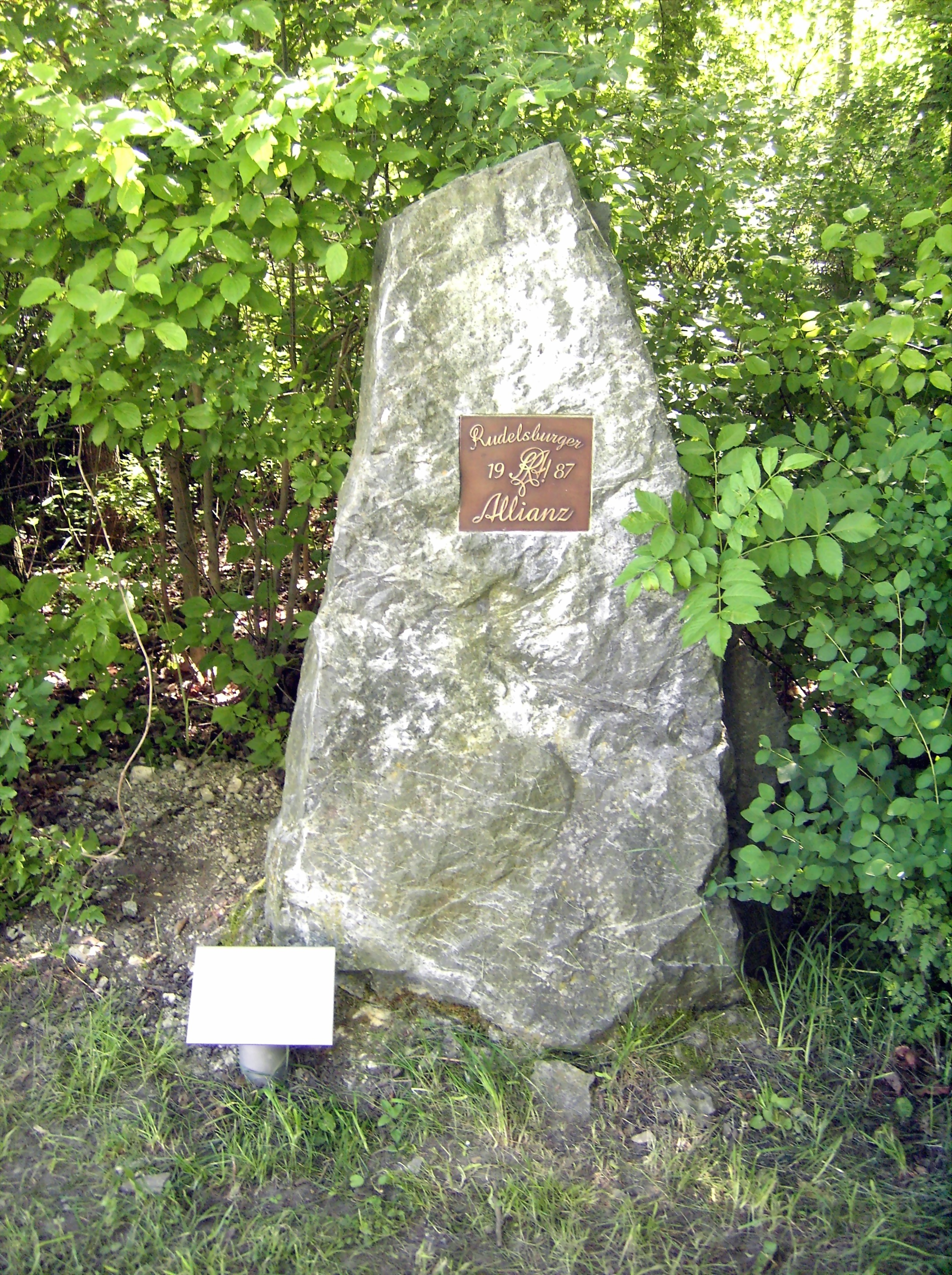 Allianzstein auf der Rudelsburg, Stein der Rudelsburger Allianz